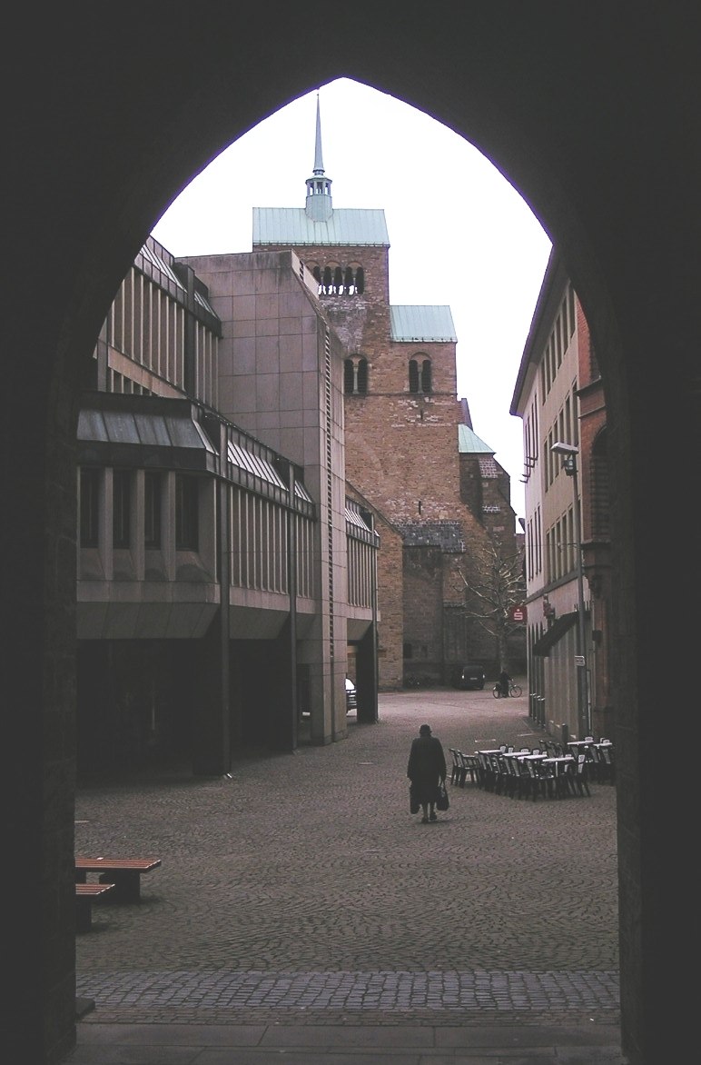 Minden, Nordrhein-Westfalen: Die heutige Sichtachse aus der Rathauslaube auf das Westwerk des Mindener Doms.